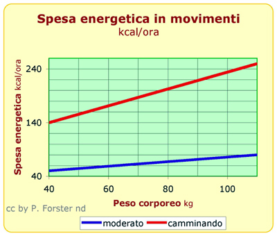 Spesa, energia, umano, peso corporeo, movimento